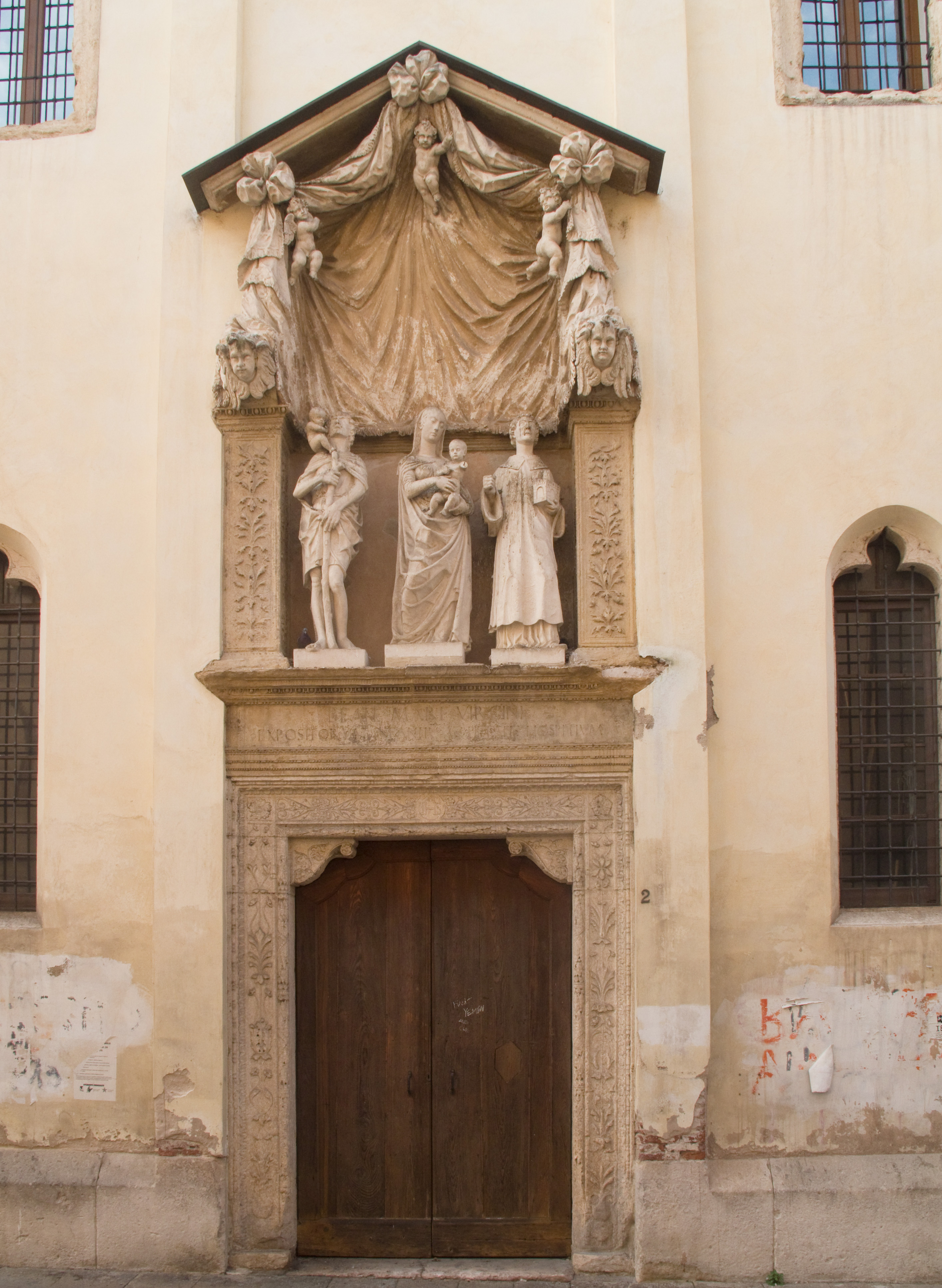 Ospedale di Santa Maria e Cristoforo (San Marcello) - portale fianco sud